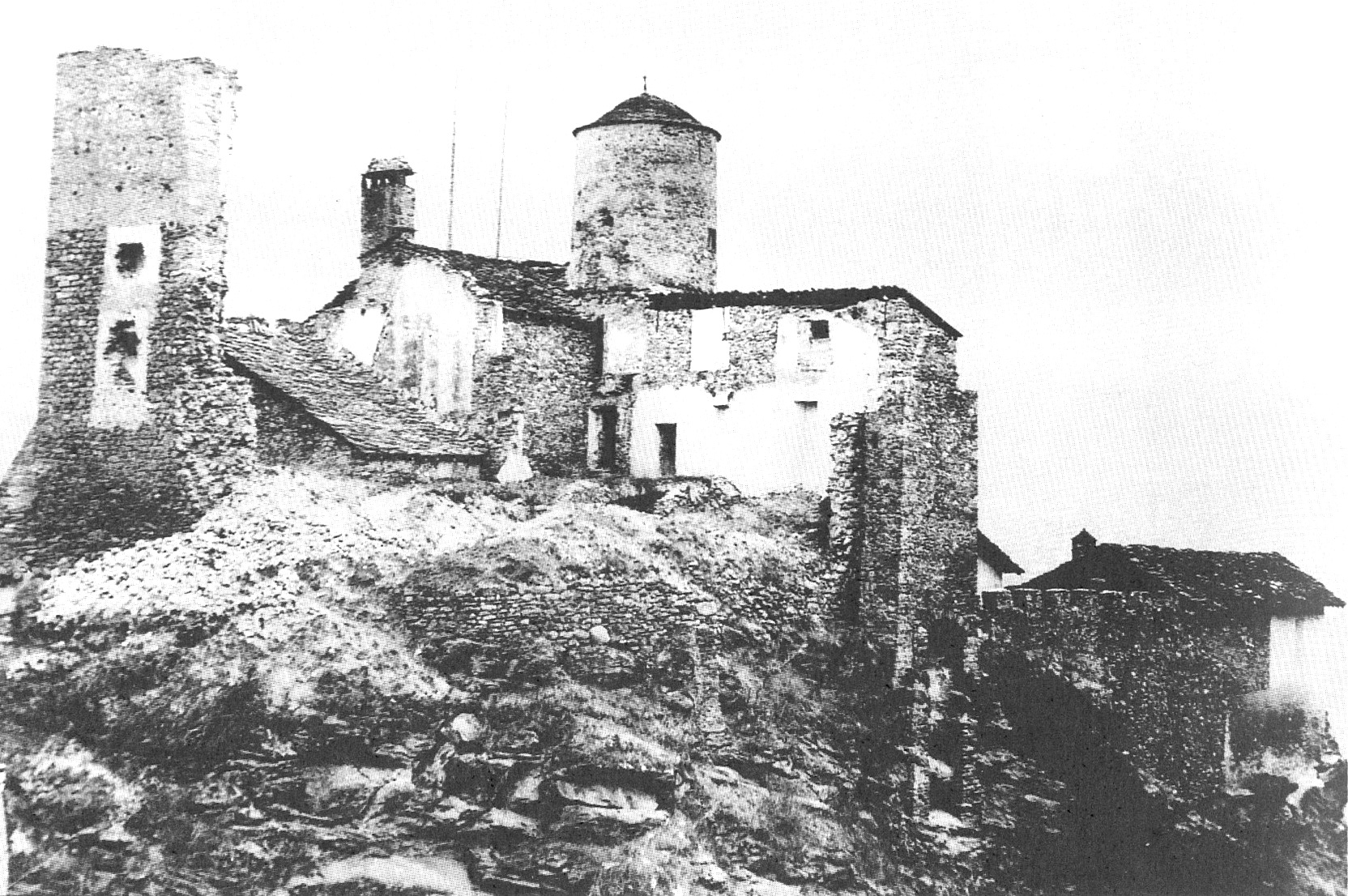 Castello di Nus facciate visto da nord-est nel 1904, si noti parte del mastio ancora in piedi tra le rovine. Nus, Valle d'Aosta, Italia. BREL, Fonds Domaine